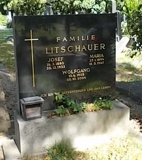 Wolfgang Litschauer Grabstätte